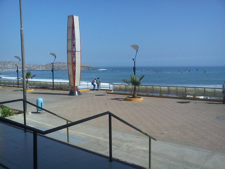 Malecón de Huacho data de 1919 ha tenido 2 reeconstrucciones, en 1988 y 2006